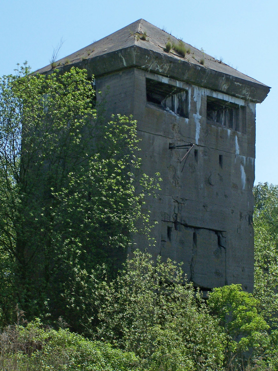 Wieża wartownicza, Fabryka Benzyny Syntetycznej w Policach